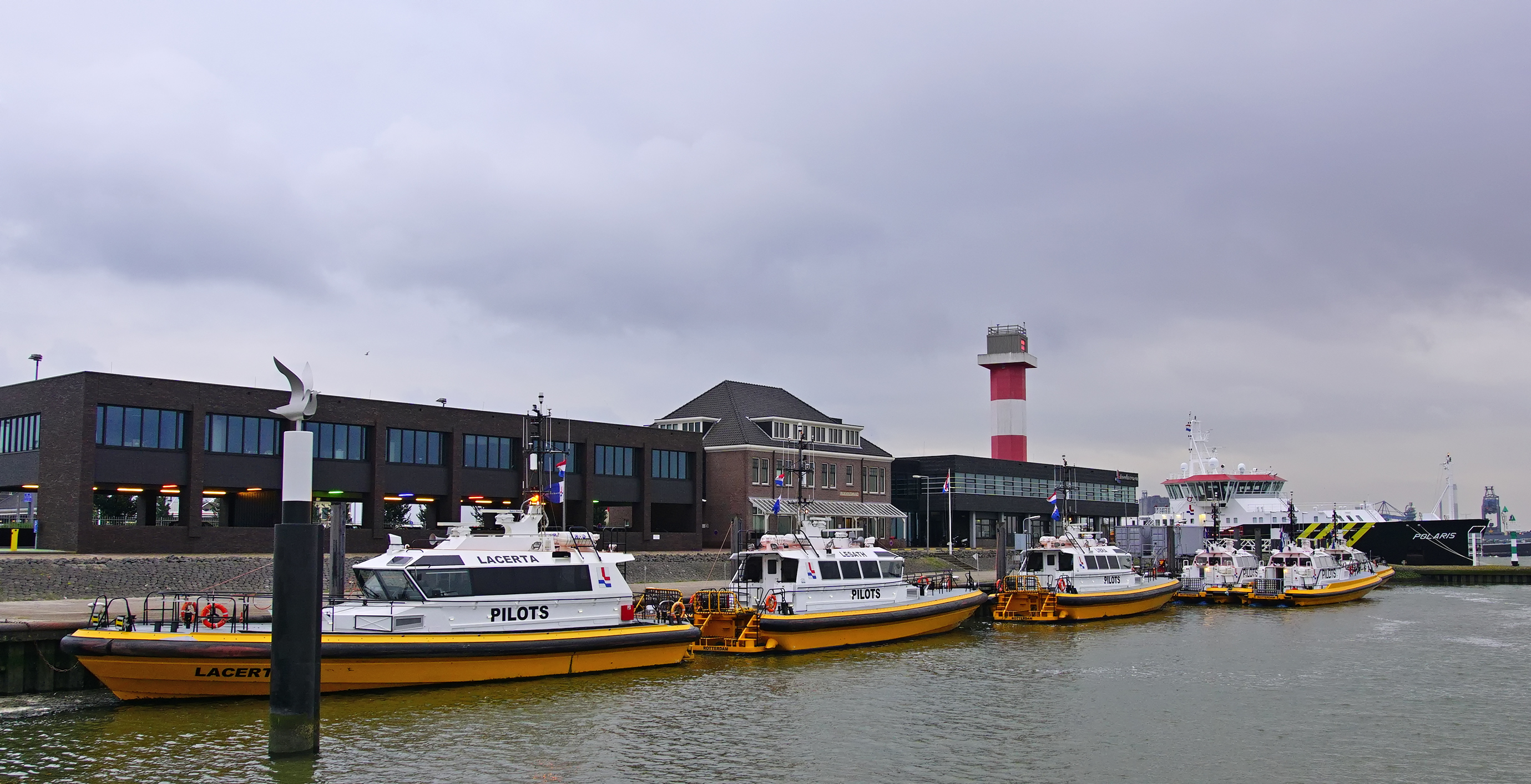 LACERTA , LESATH , AQUILA , LIBRA , APOLLO , MERCURY & POLARIS.